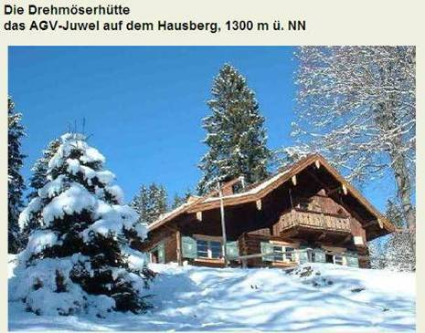 Die Skihütte des Bayerischen Skiverbands e.V. während der Skiweltmeisterschaften in Garmisch-Partenkirchen 2011